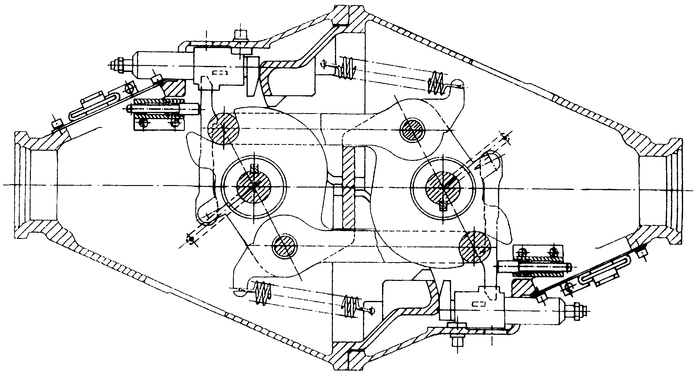 Entkuppelte Stellung des Zweistellungsverschlusses einer Scharfenbergkupplung